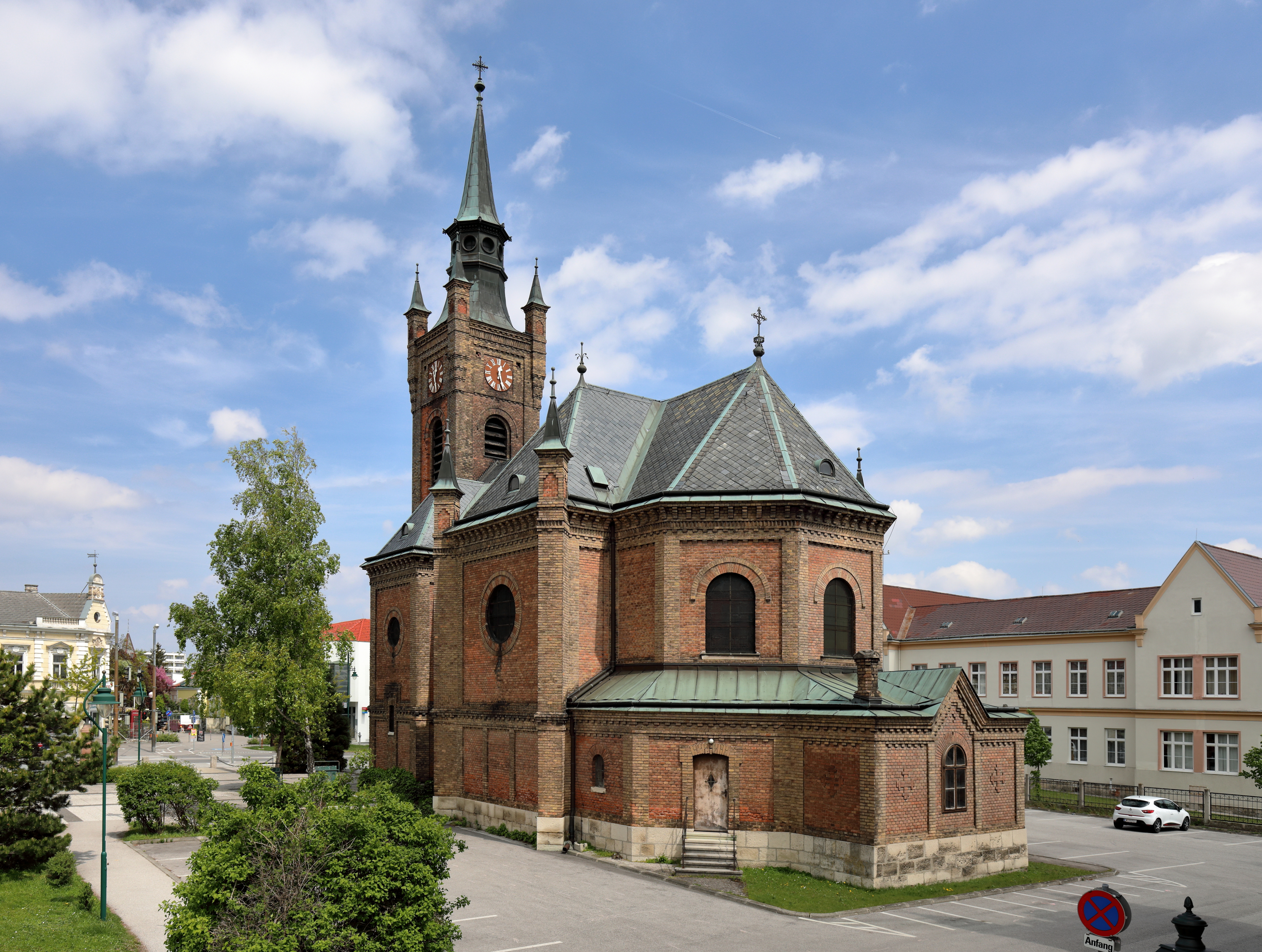 Südwestansicht der ehem. Waisenhauskirche hl. Josef in der niederösterreichischen Bezirkshauptstadt Mödling. Die späthistoristische Backsteinkirche wurde im Zuge der Errichtung des Hyrtl’schen Waisenhauses von 1886 bis 1888 nach Plänen von Sehnal gebaut.